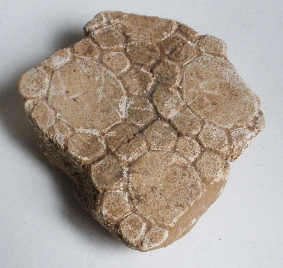 Fossil of Hoplophorus, an extinct edentate - Took the photo at Teylers Museum, Haarlem